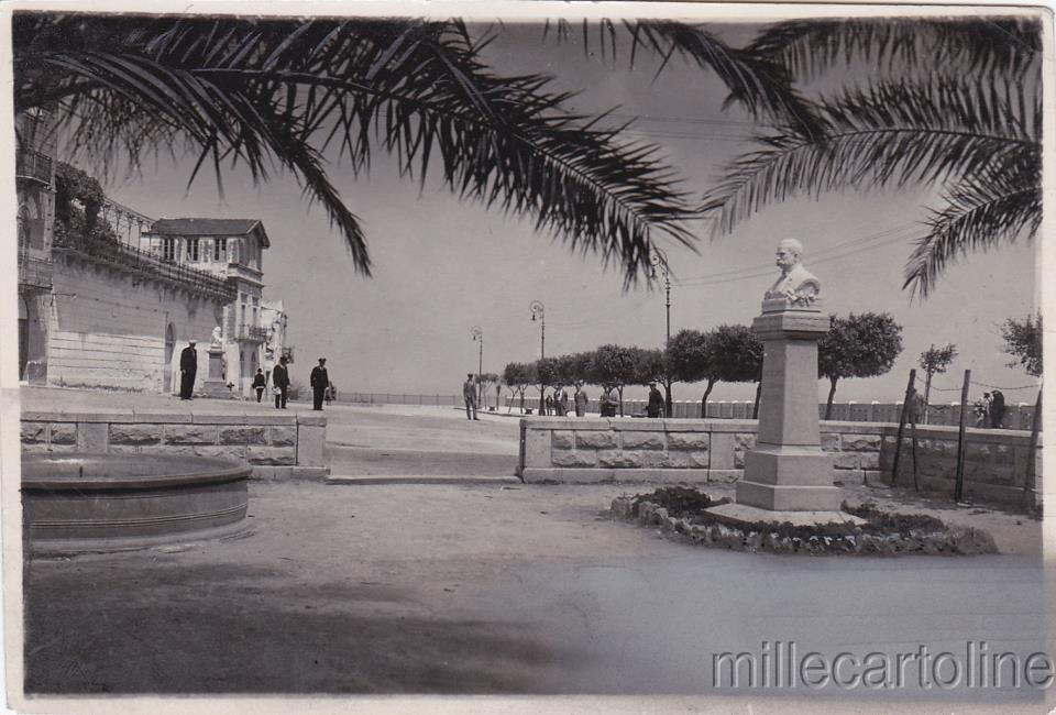 Piazza Bagolino vista dalla villa omonima